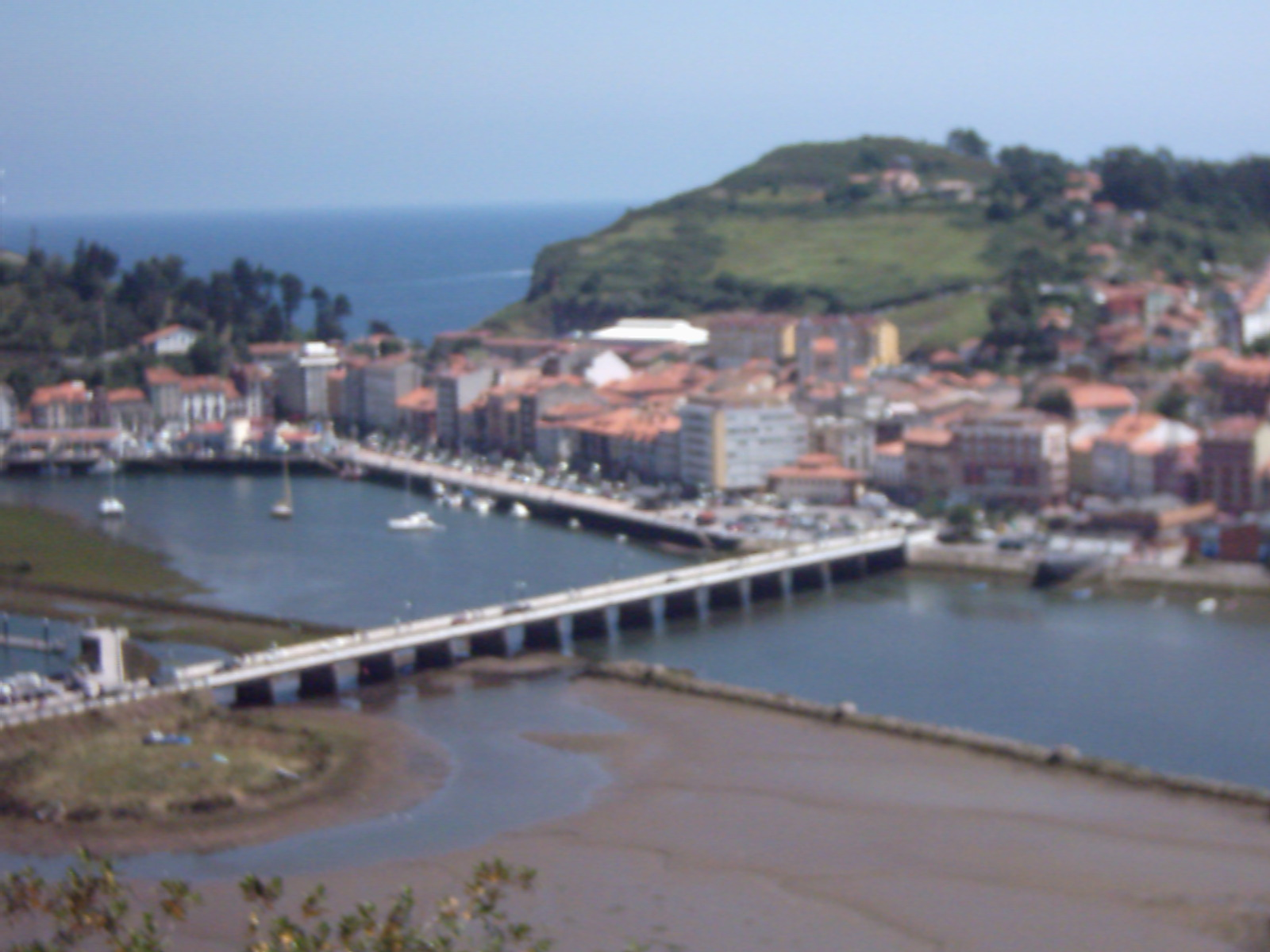 Ría de Ribasella, en la desembocadura del río Sella